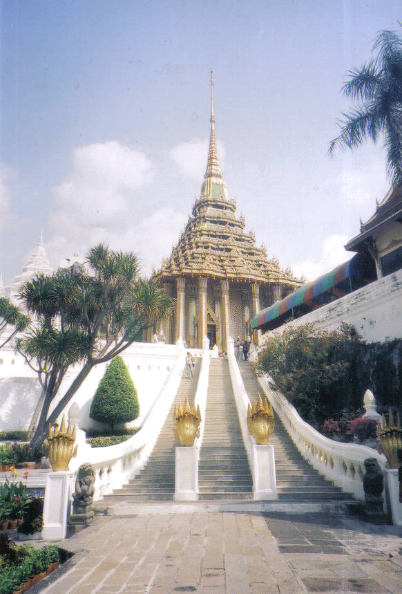 Wat Phra Phuttha Baht in Saraburi, Thailand